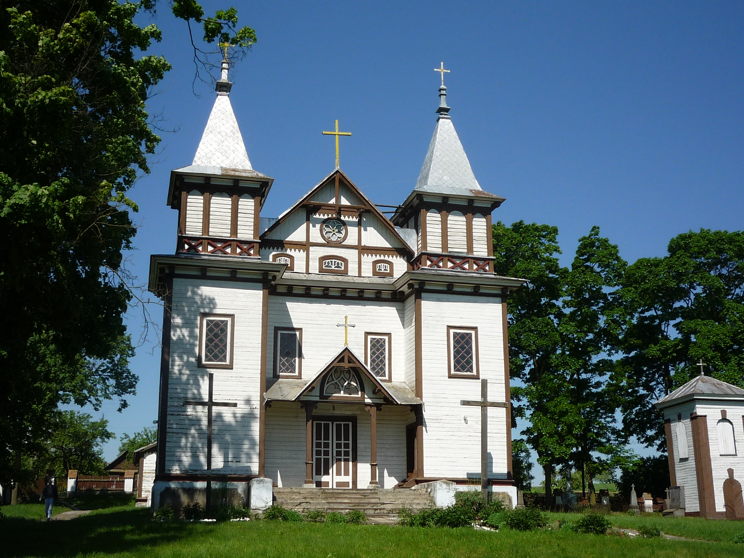 Беларуская (тарашкевіца): Юр’еўскі касьцёл. в. Паланэчка This is a photo of Belarusian heritage monument. Reference number: 112Г000062 ( WLM)